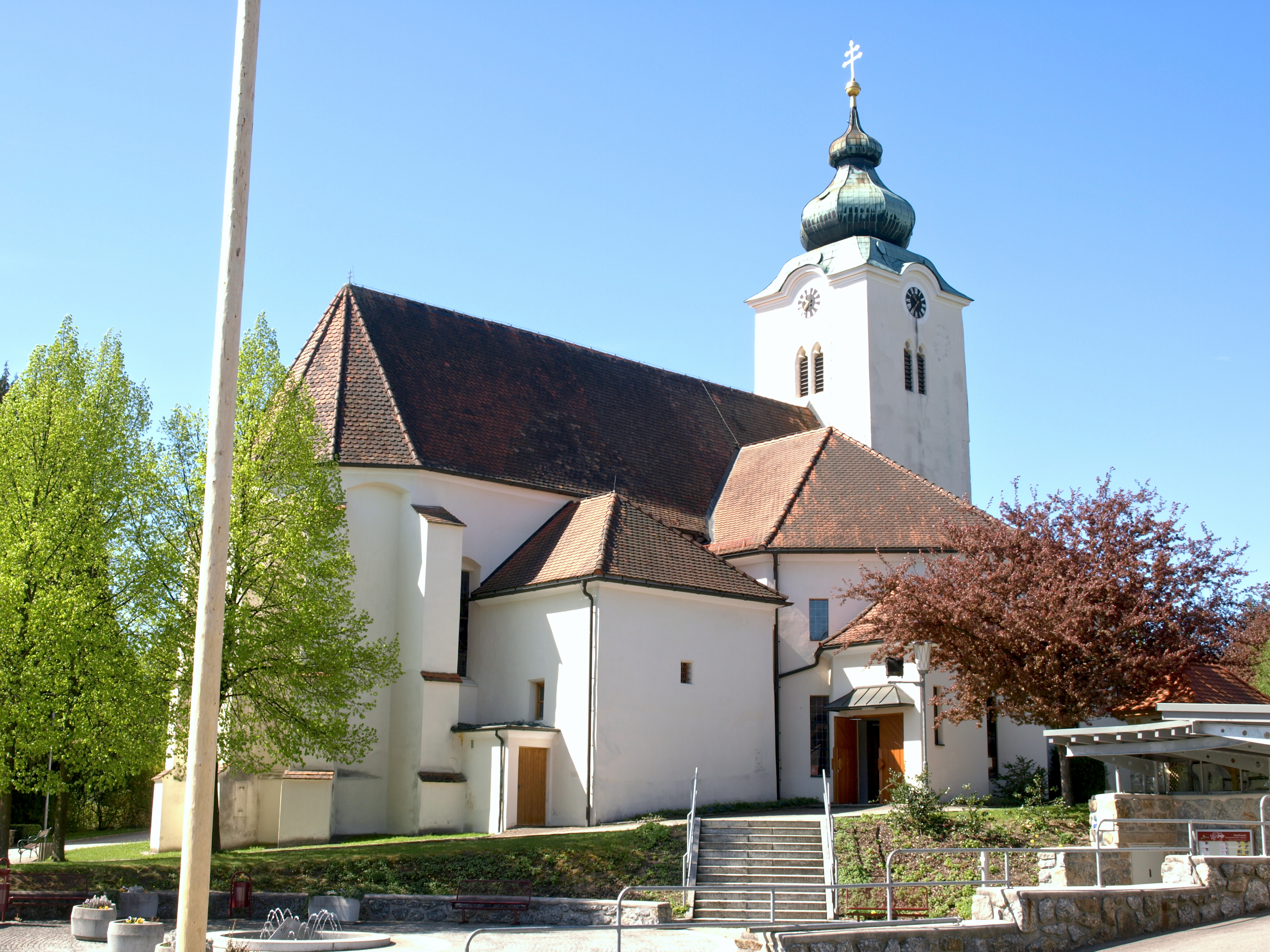 Kath. Pfarrkirche hl. Martin und Glocke